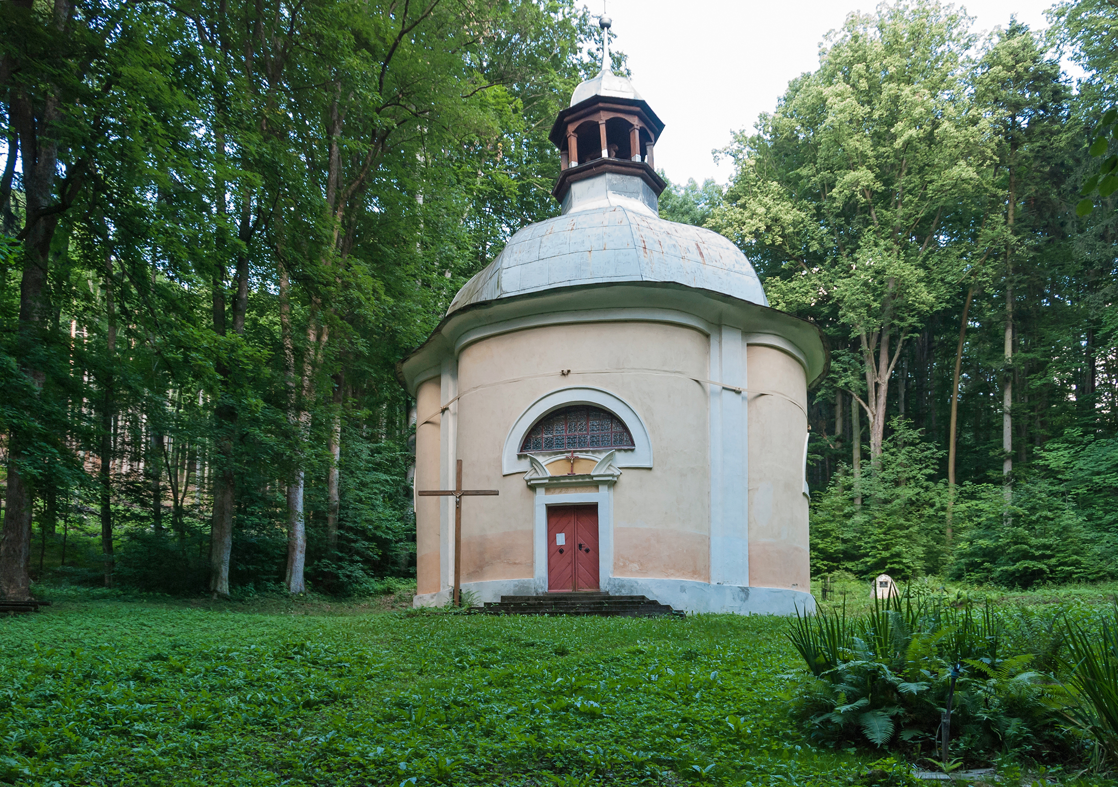 Gorzanów, kaplica odpustowa p.w. św. Antoniego Padewskiego na Górze Dębowej, 1 poł. XVIII